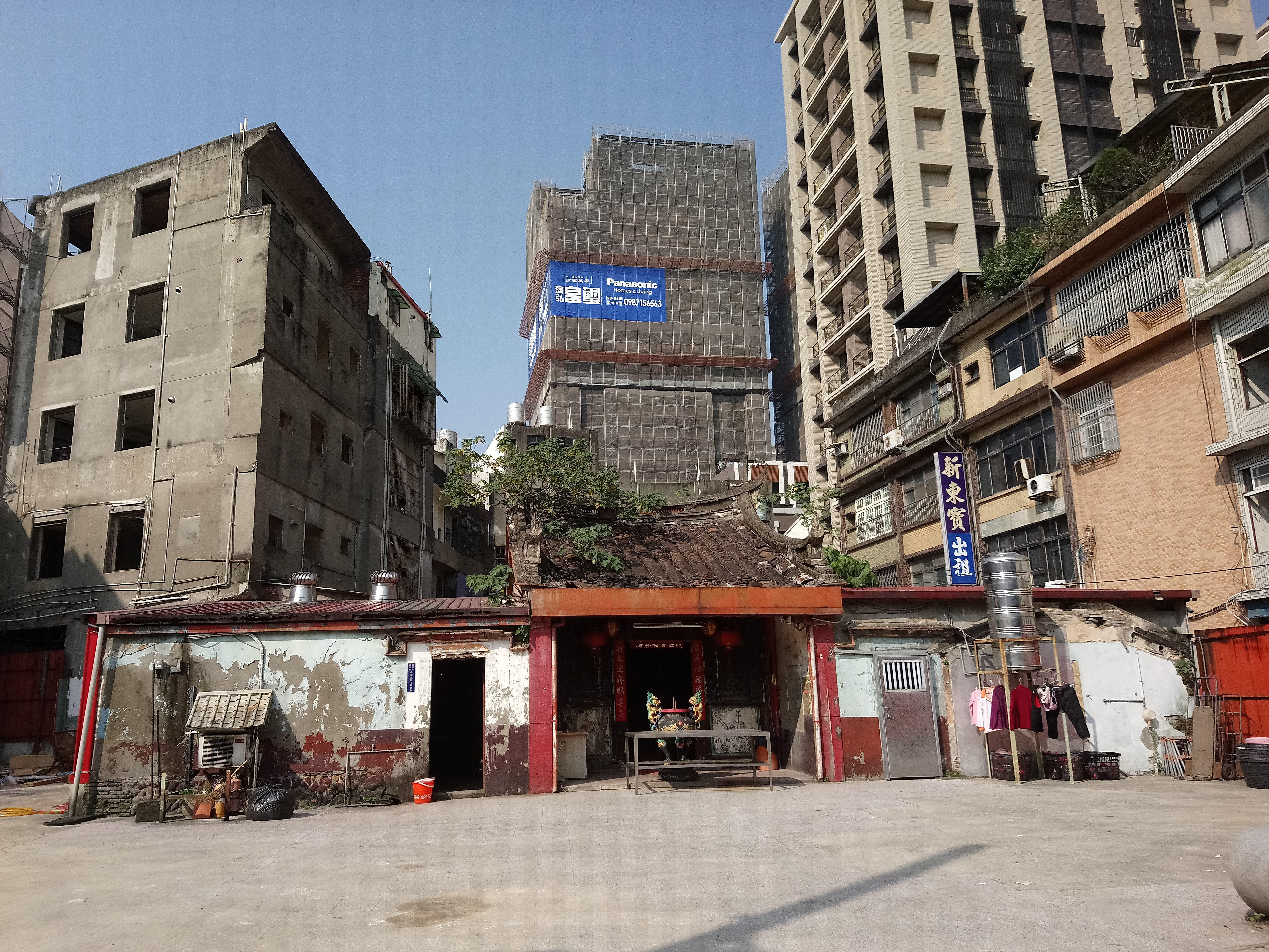 桃園西廟,桃園市桃園區市中次分區西湖里